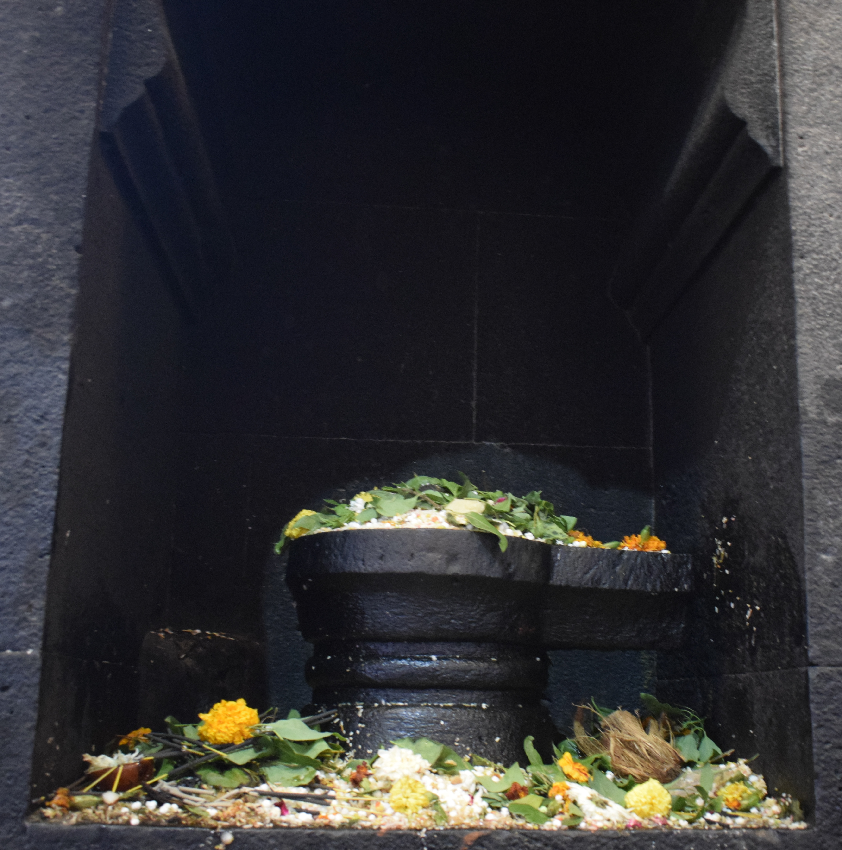 श्री नंदिकेश्वर लिंग